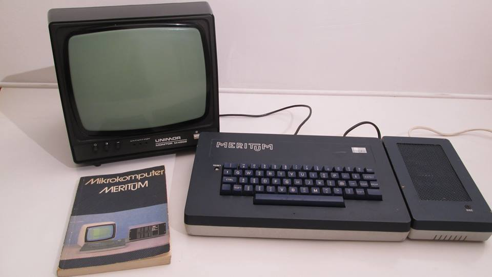 Zestaw podstawowy Meritum I i Unimor Monitor M4902.